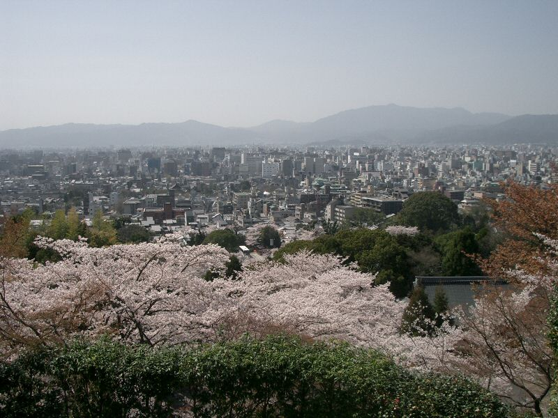 京都東山から見た京都市街"Kyoto higashiyama"